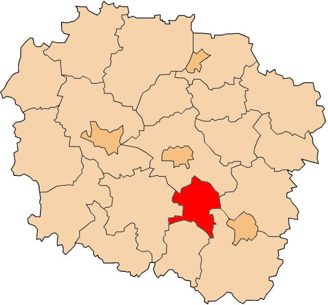 Powiat aleksandrowski na mapie województwa kujawsko-pomorskiego.